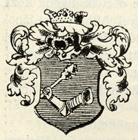 Stema familiei Virágosberk